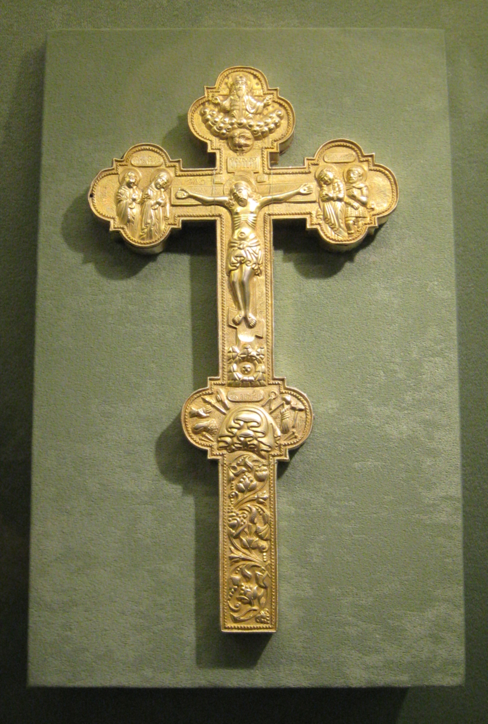 Крест напрестольный, 1725